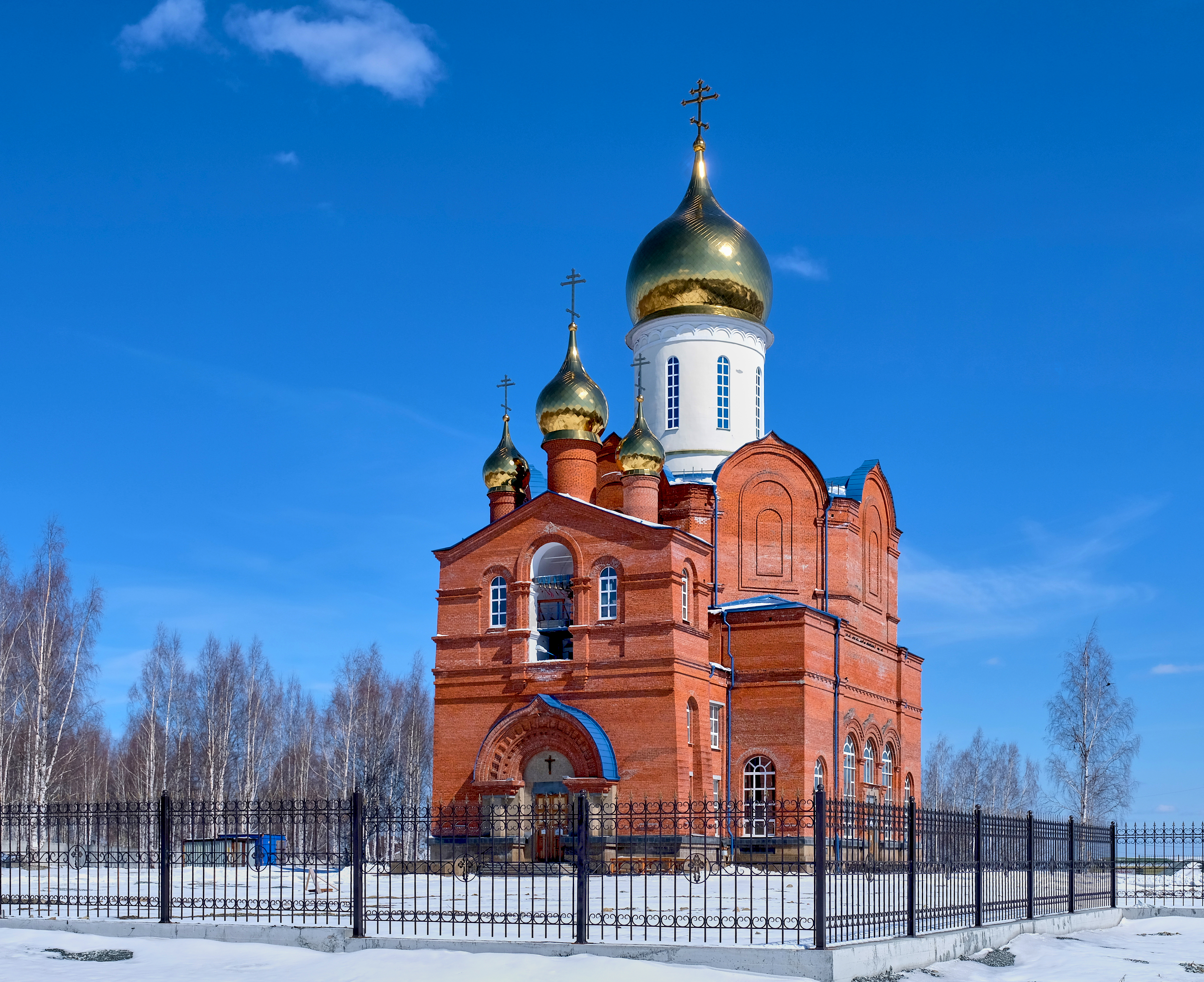 Храм иконы Божией Матери «Взыскание погибших» в Качканаре